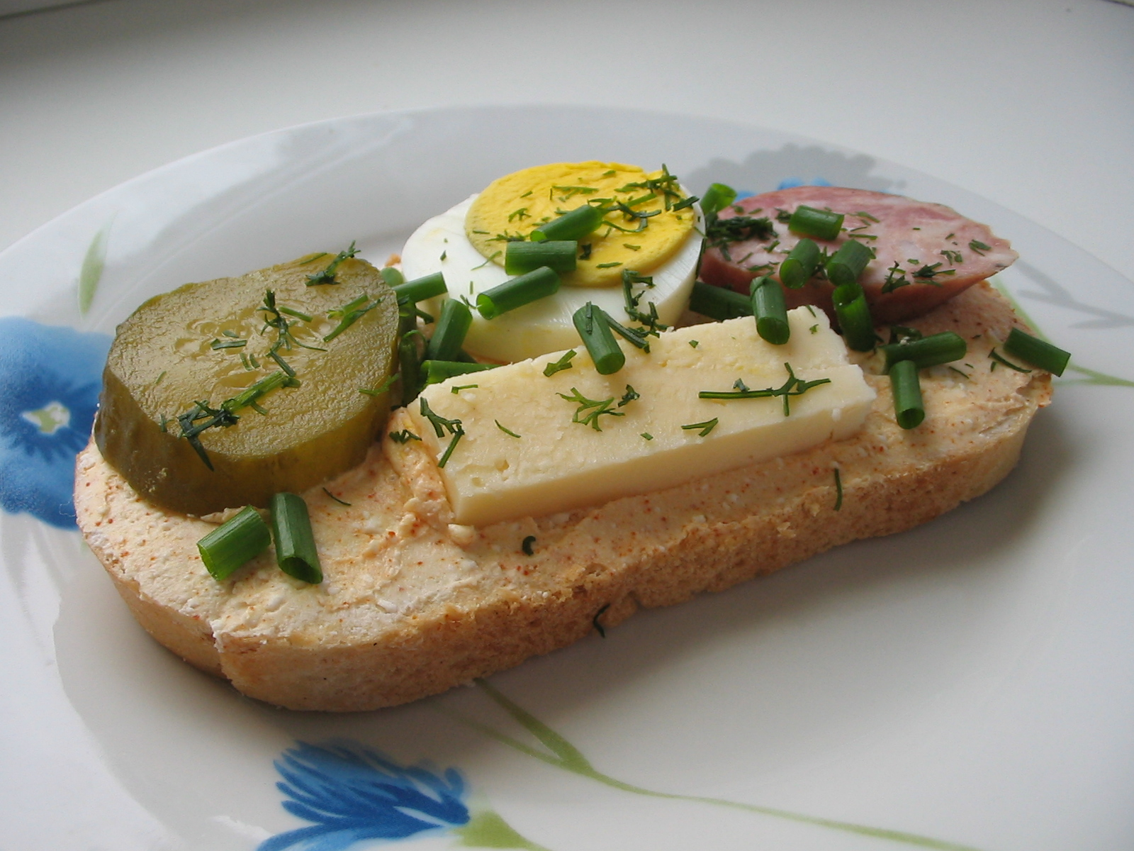 Канапка весільна. скибка булки, намащена сумішшю домашнього сиру та вершкового масла, червоного перцю, солі; поверх якої наложено скибками сол. огірок, твердий сир, ковбаса, варене яйце та притрушена зеленню кропу та цибулі.